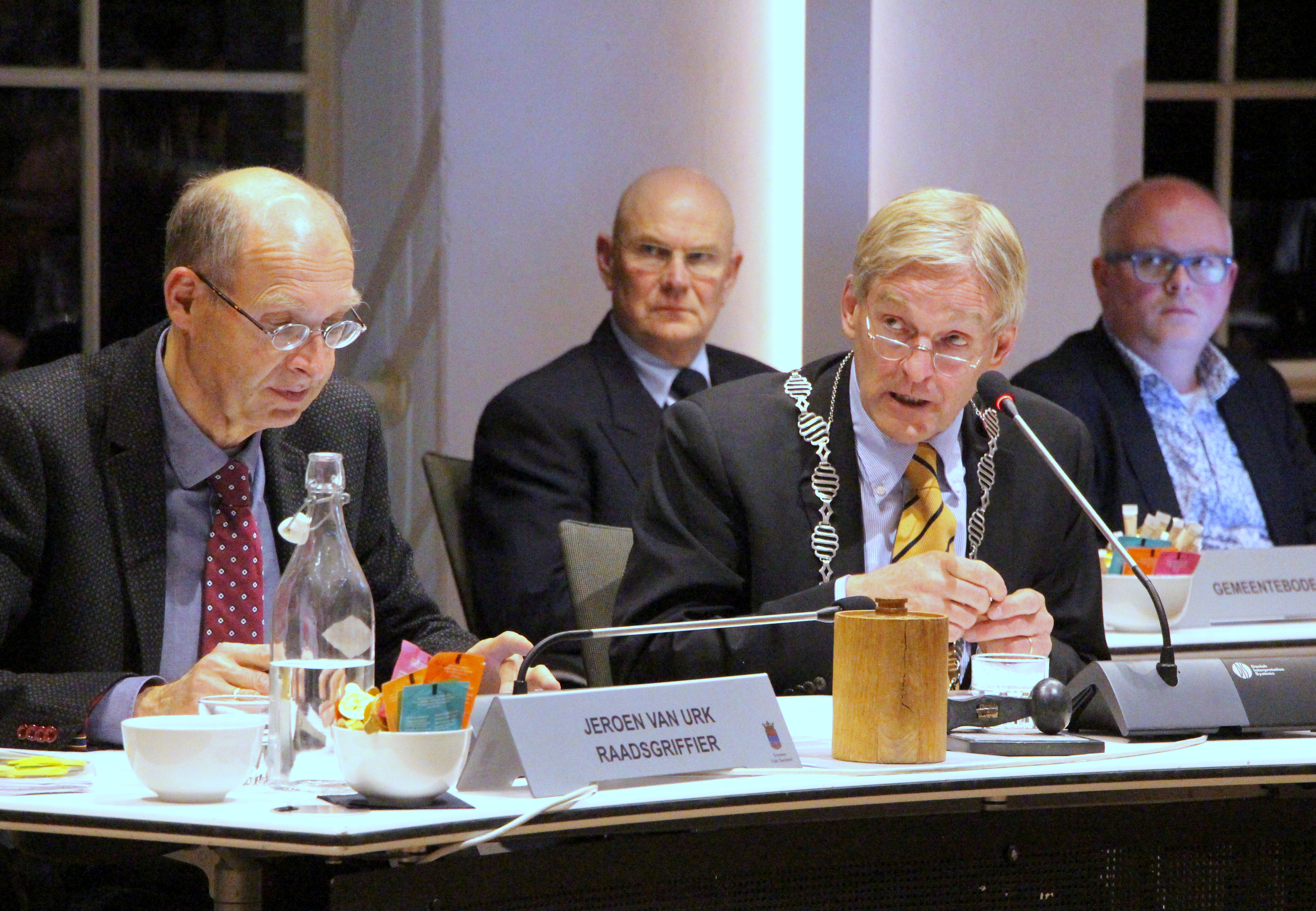 Raadsvergadering in de gemeente Oude IJsselstreek. Eerste zitting met de nieuwe (waarnemende) burgemeester Steven de Vreeze.